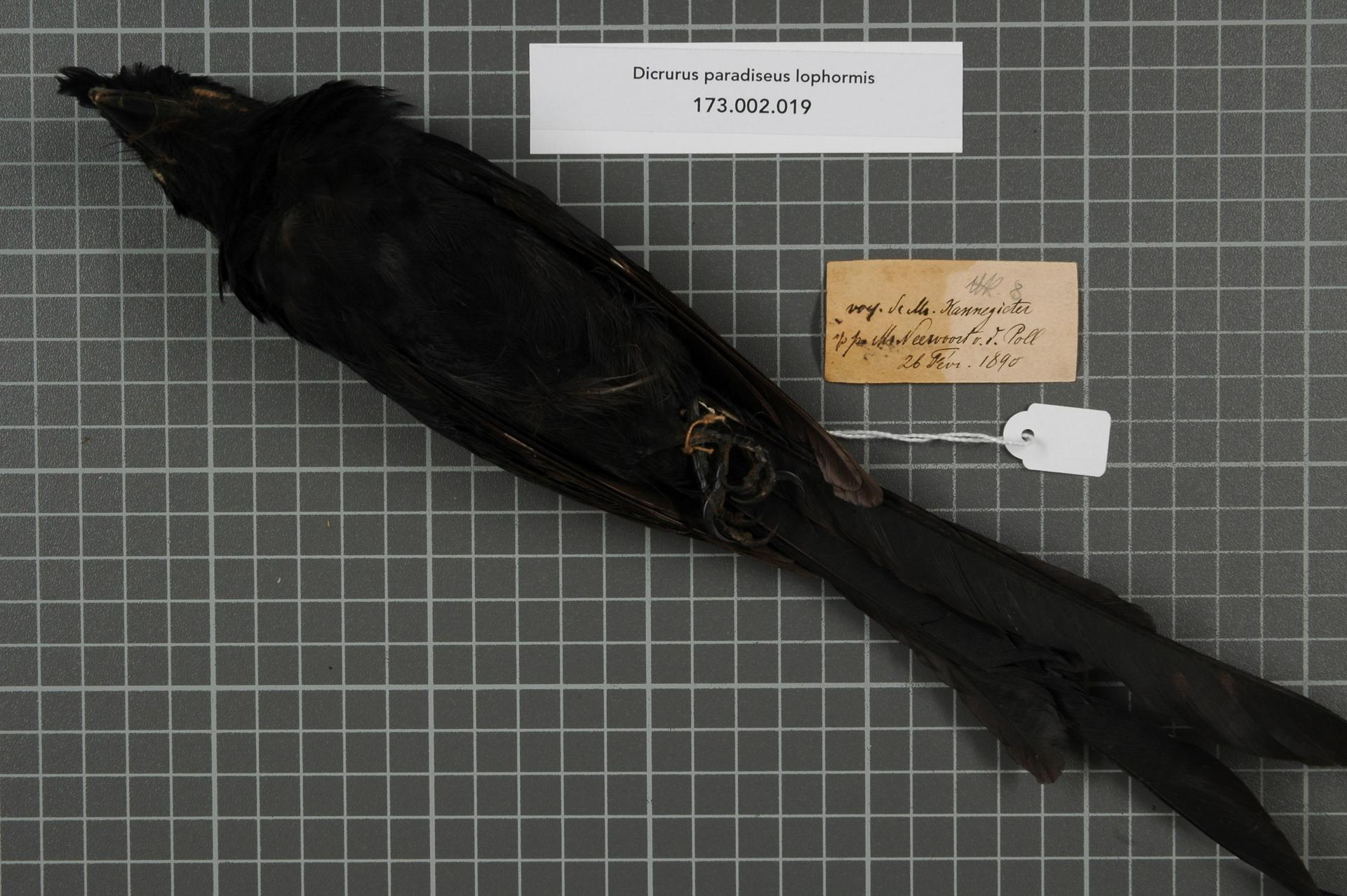 Dicrurus paradiseus lophormis Vieillot, 1817